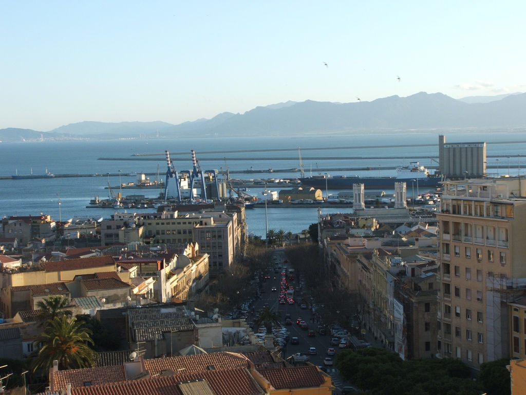 Largo Carlo Felice